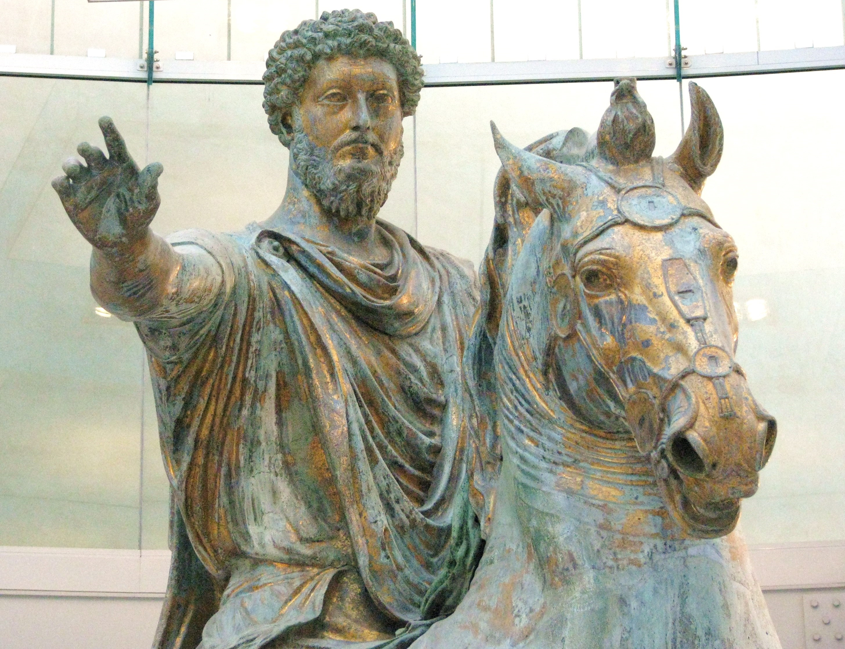 Equestrian statue of Marcus Aurelius, Rom, Musei Capitolini - Detail